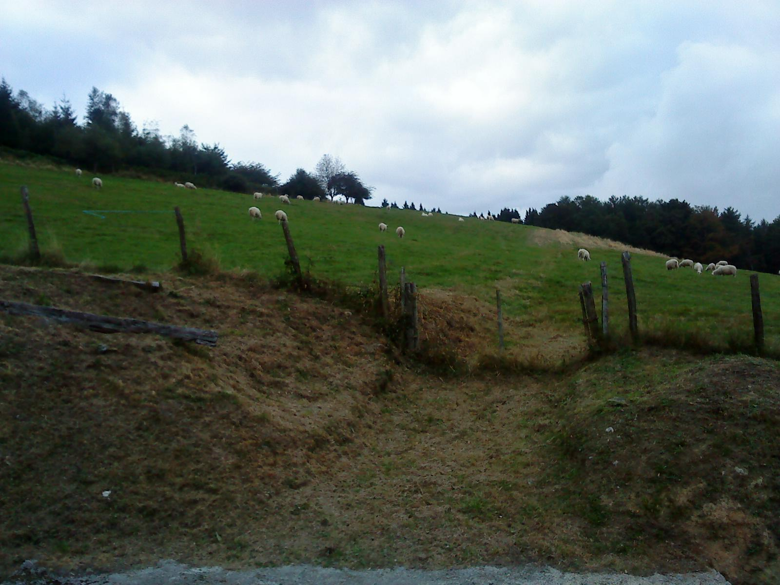 Prado de pasto con ovejas pastando en el Parque natural de Urkiola en Bizkaia País Vasco (España).